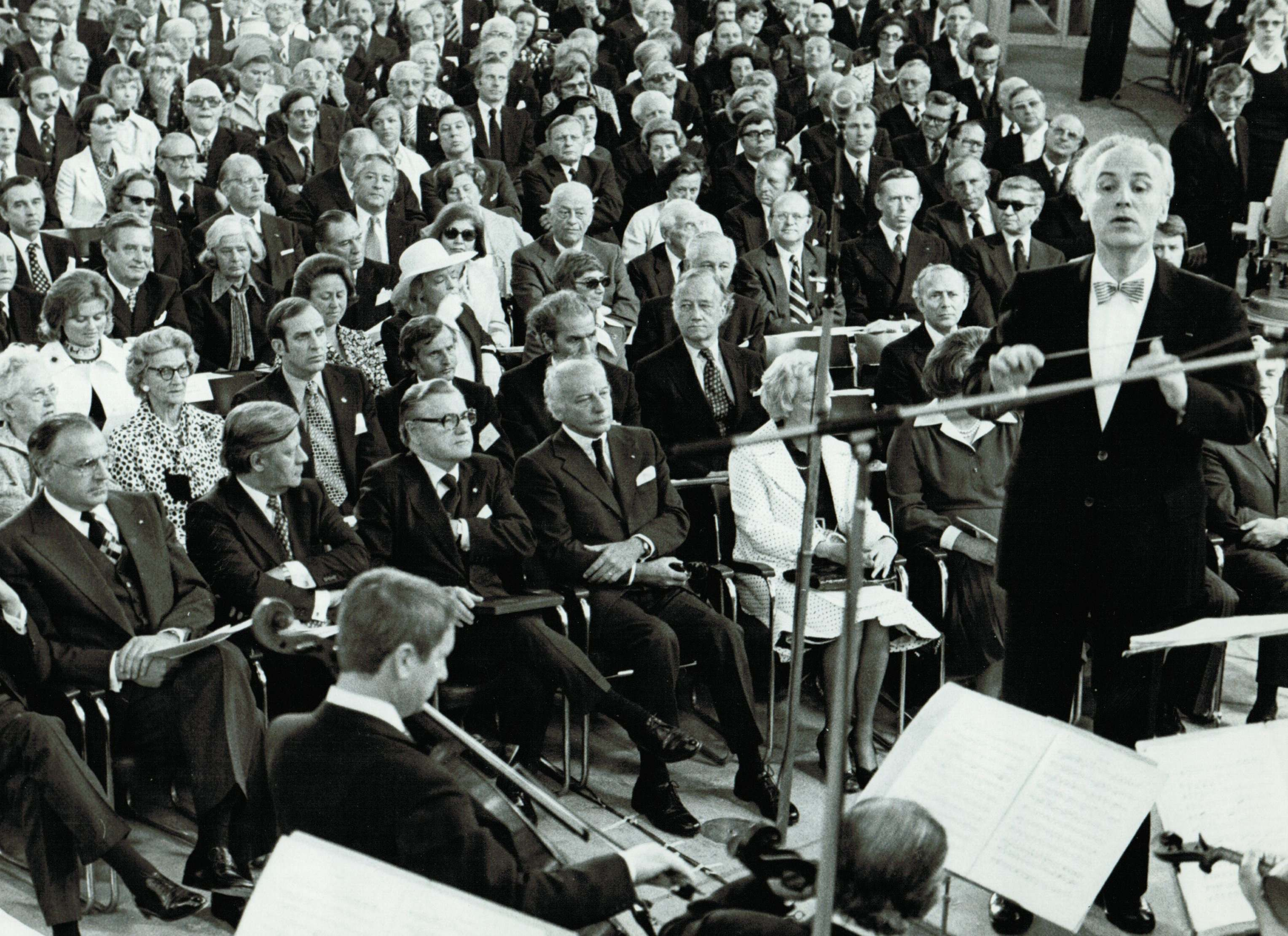 Helmut Steinbach dirigiert in der Paulskirche u.a. vor (1.Reihe:) Helmut Kohl, Helmut Schmidt, Walter Scheel; (3.Reihe links:) Hannelore Kohl